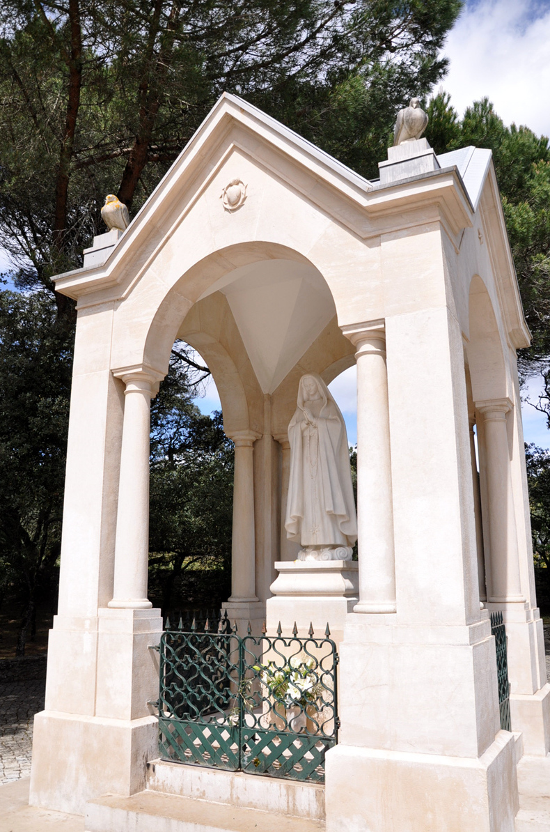 Calváro Hungaro Fatima 0594